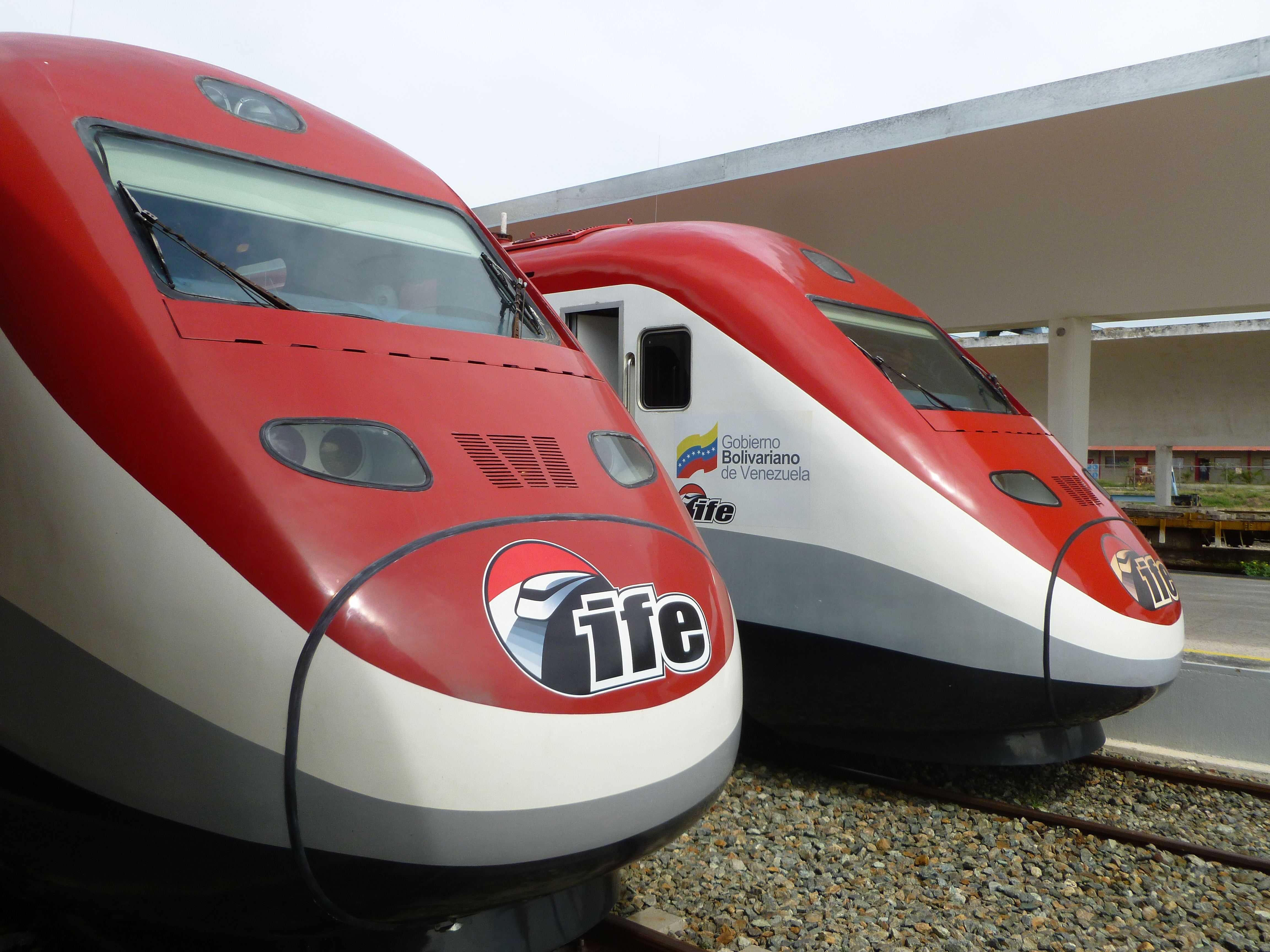 Tren de pasajeros de fabricación china para el tramo Simón Bolívar Venezuela.